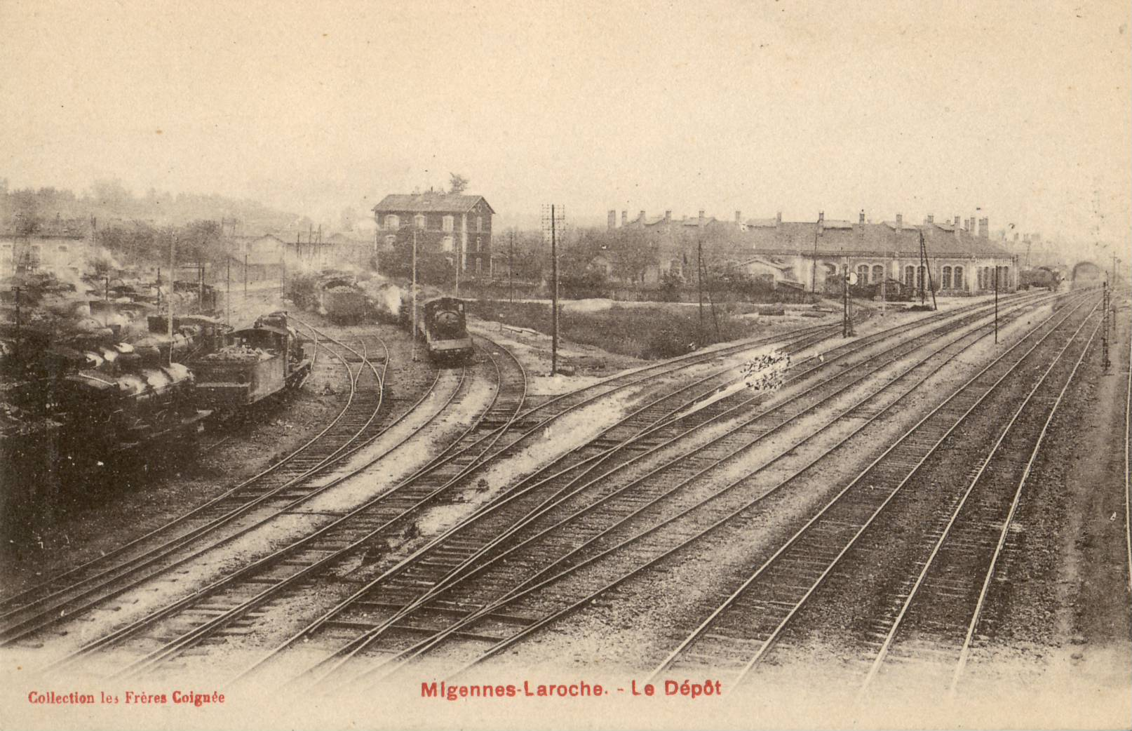 Carte postale ancienne éditée par les frères Coignée : MIGENNES-LAROCHE - Le Dépôt